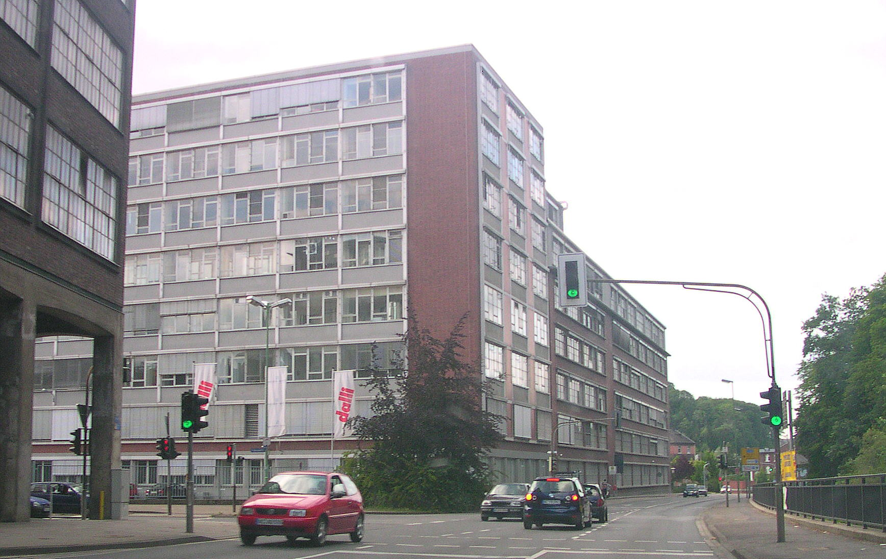 Stolberg, Dalli-Werke Mäurer und Wirtz